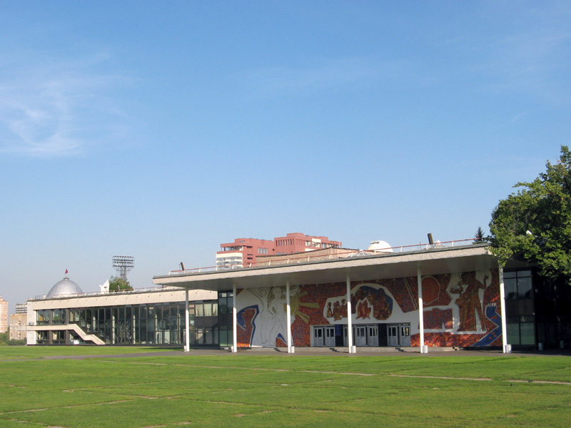 здание дома детского (юношеского) творчества (бывшего Дворца пионеров) на Воробьёвых горах в Москве